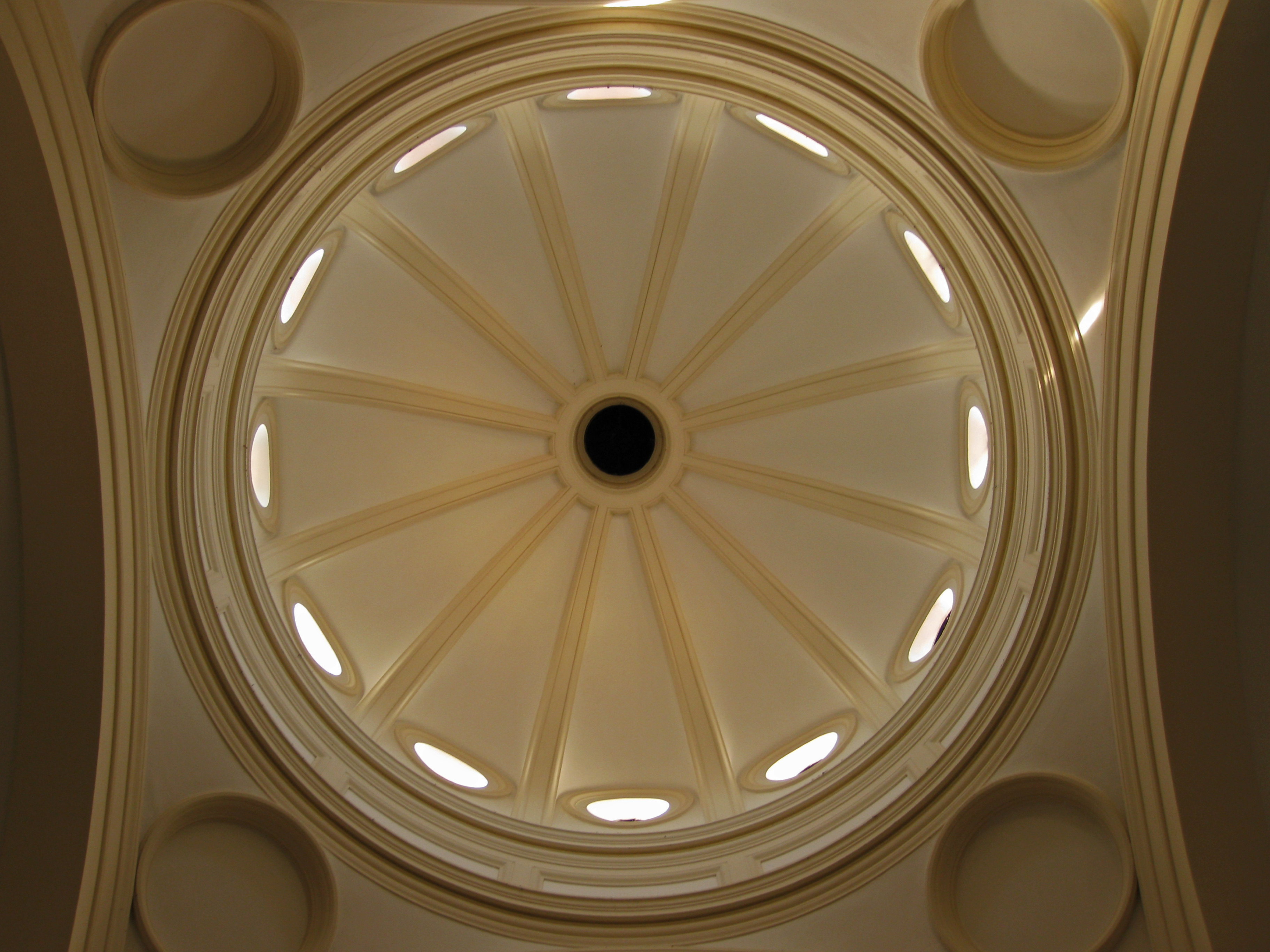 Das Faniteum wurde von 1894 bis 1896 nach Plänen von Emanuel La Roche im Stil der Neorenaissance erbaut. Es diente ursprünglich als von Karl Lanckoroński gestiftetes Mädchengenesungsheim mit Mausoleum. Seit 1974 ist hier das Kloster St. Josef der unbeschuhten Karmelitinnen untergebracht, das von 1976 bis 1977 nach Plänen von Walter Hildebrand erweitert wurde.